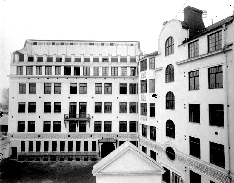 Anna Sandströms skola, Karlavägen 25, gården. Byggnadsår 1906-08. Arkitekter Hagström & Ekman